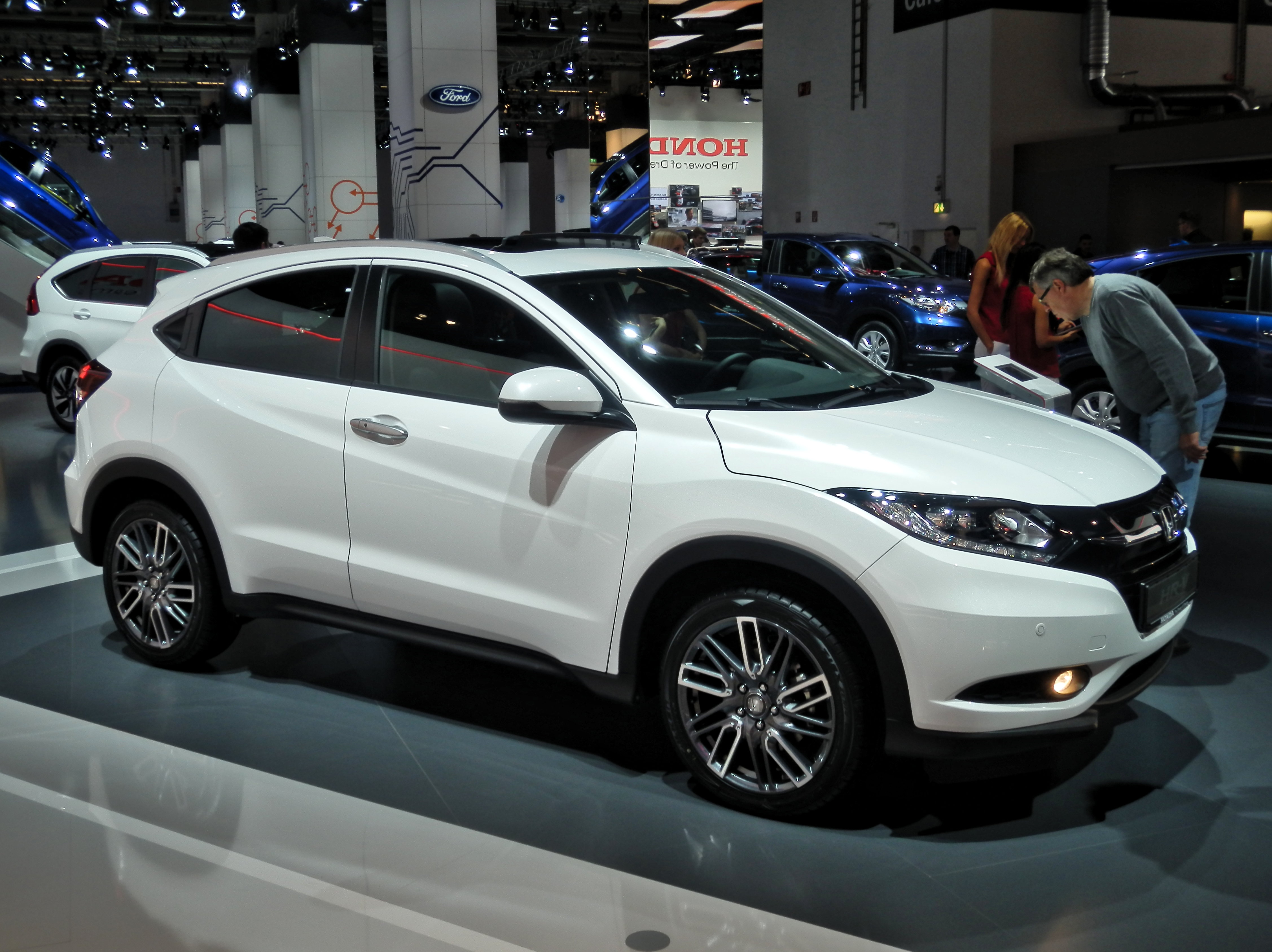 Honda HR-V at IAA 2015